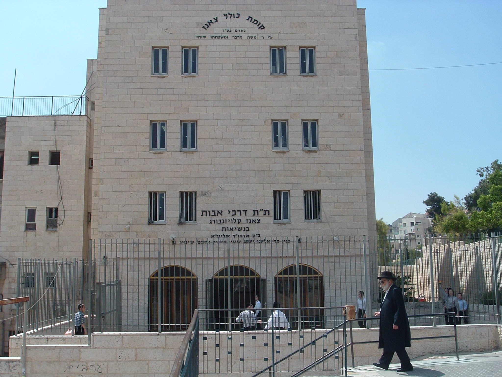 בנין מוסדות חסידות צאנז, דברי חיים 2 ירושלים